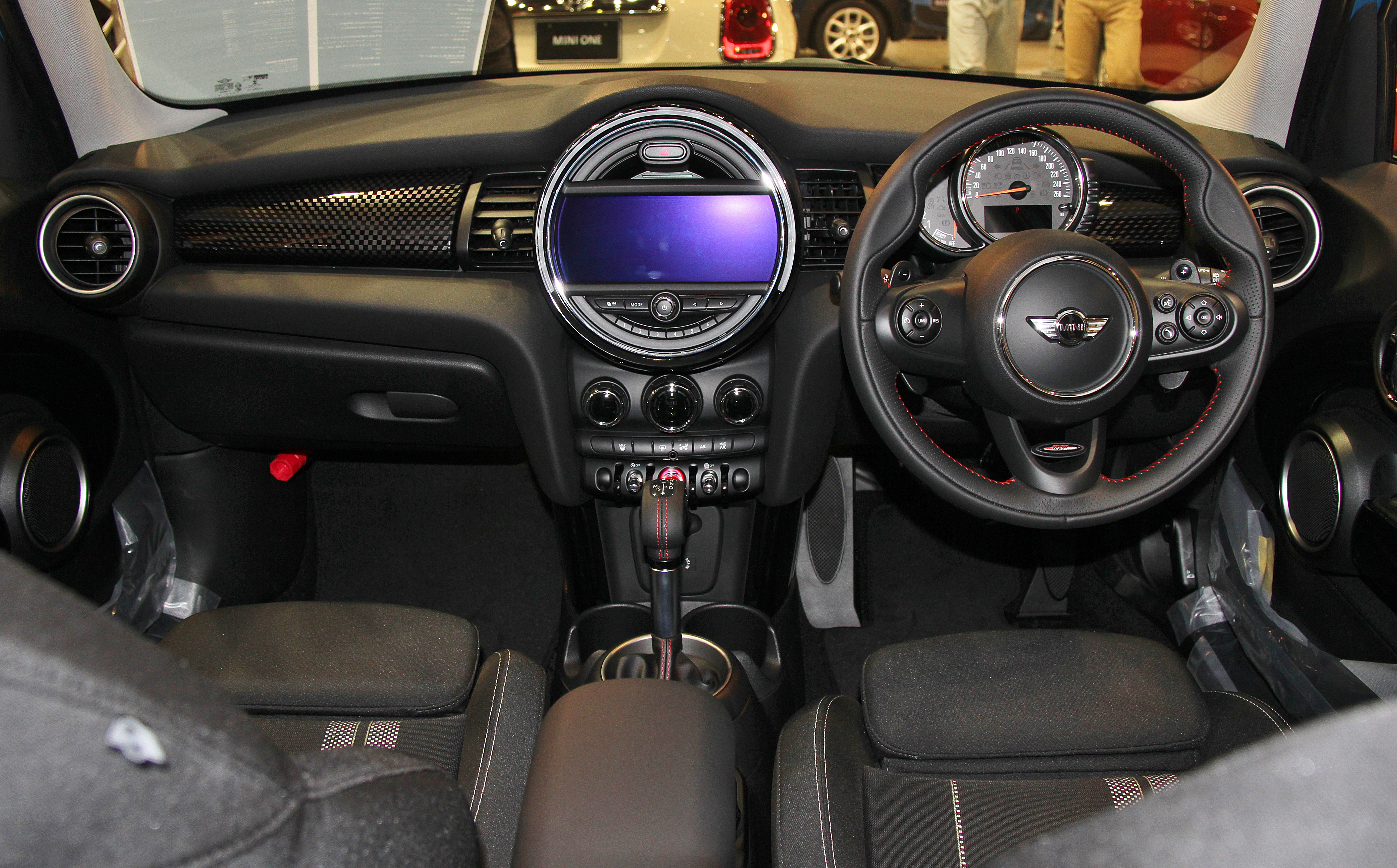 Mini Cooper S 5 Door